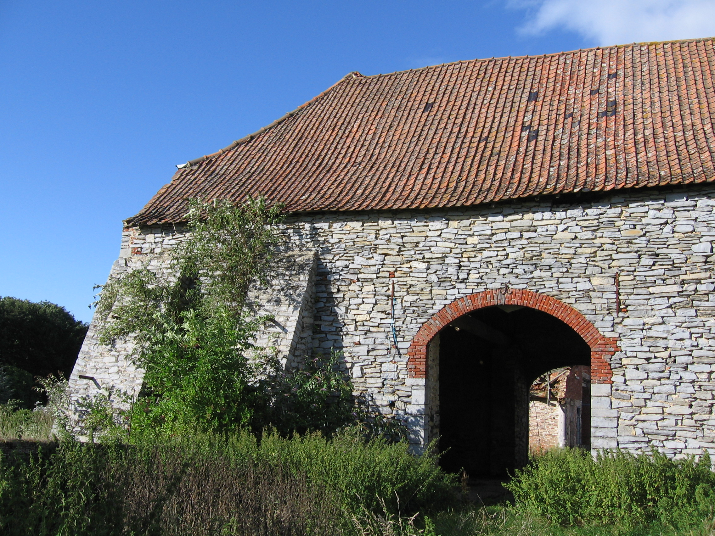 Grange de l'ancienne chartreuse de Chercq près de Tournai en Belgique